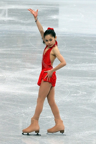 Сатоко Мияхара (Япония) на чемпионате мира по фигурному катанию среди юниоров 2012